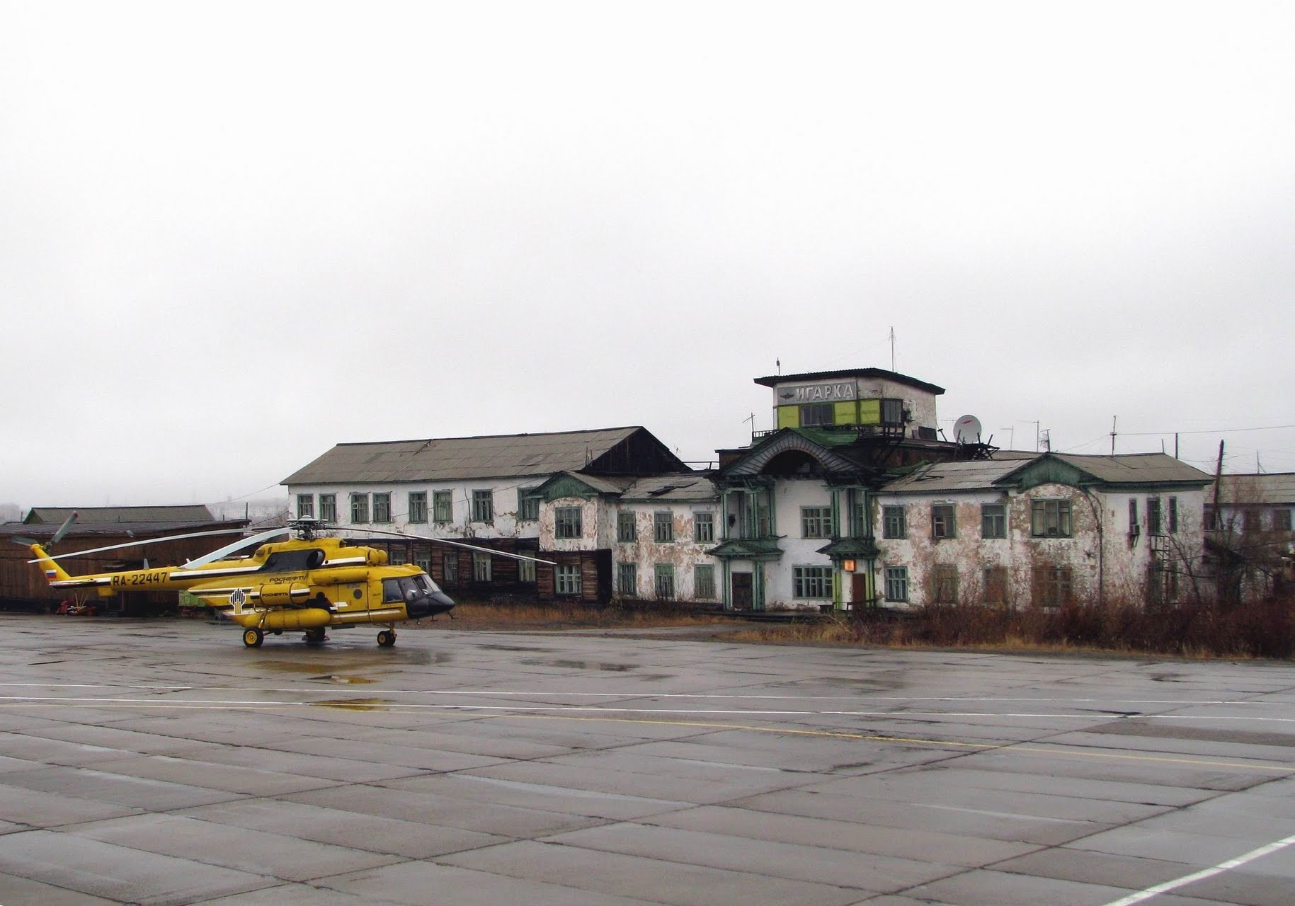 Старый терминал аэропорта Игарка